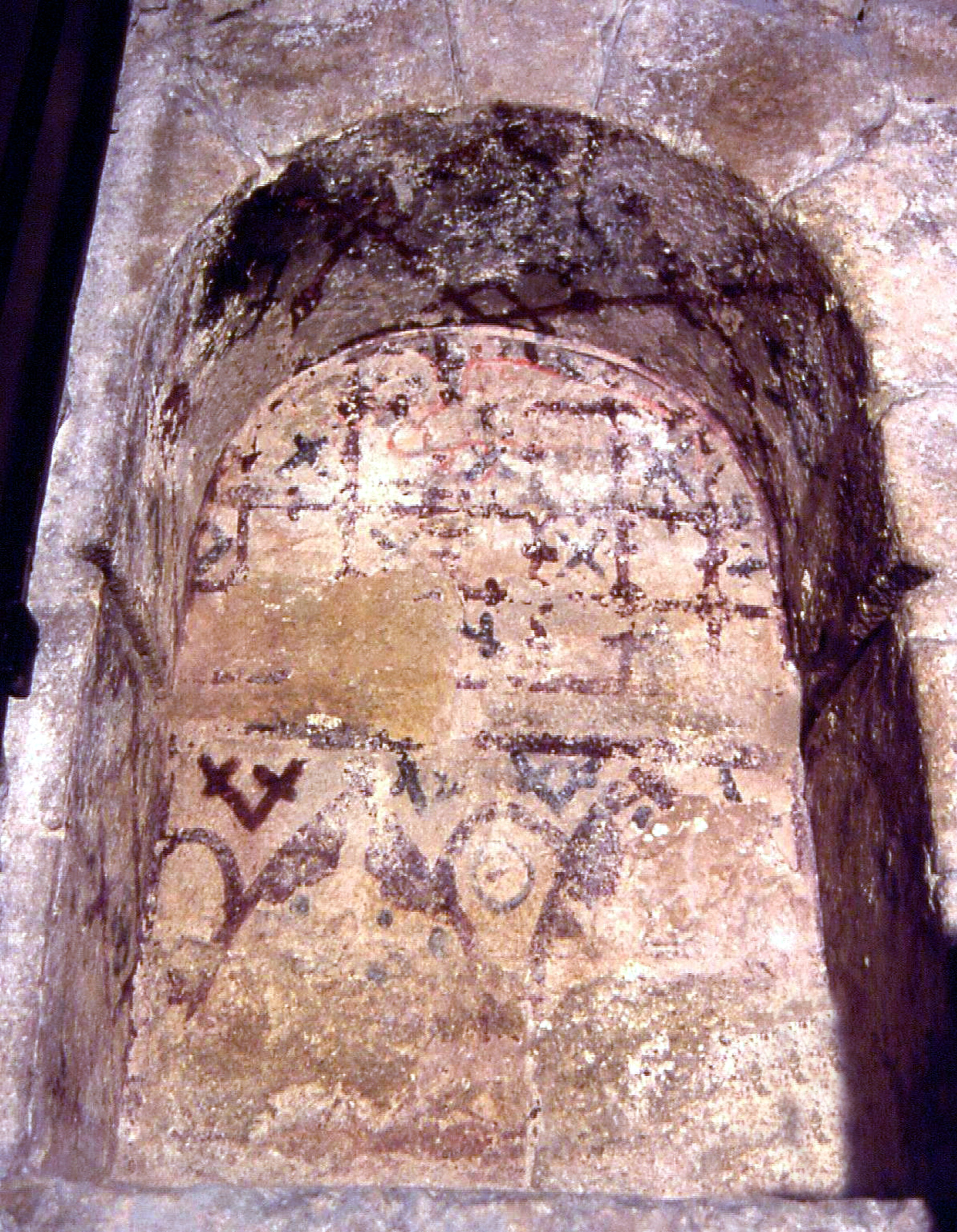 Barcelana, capella templera de Palau. Armari litúrgic del presbiteri. Fot. J. Fuguet, 2006.